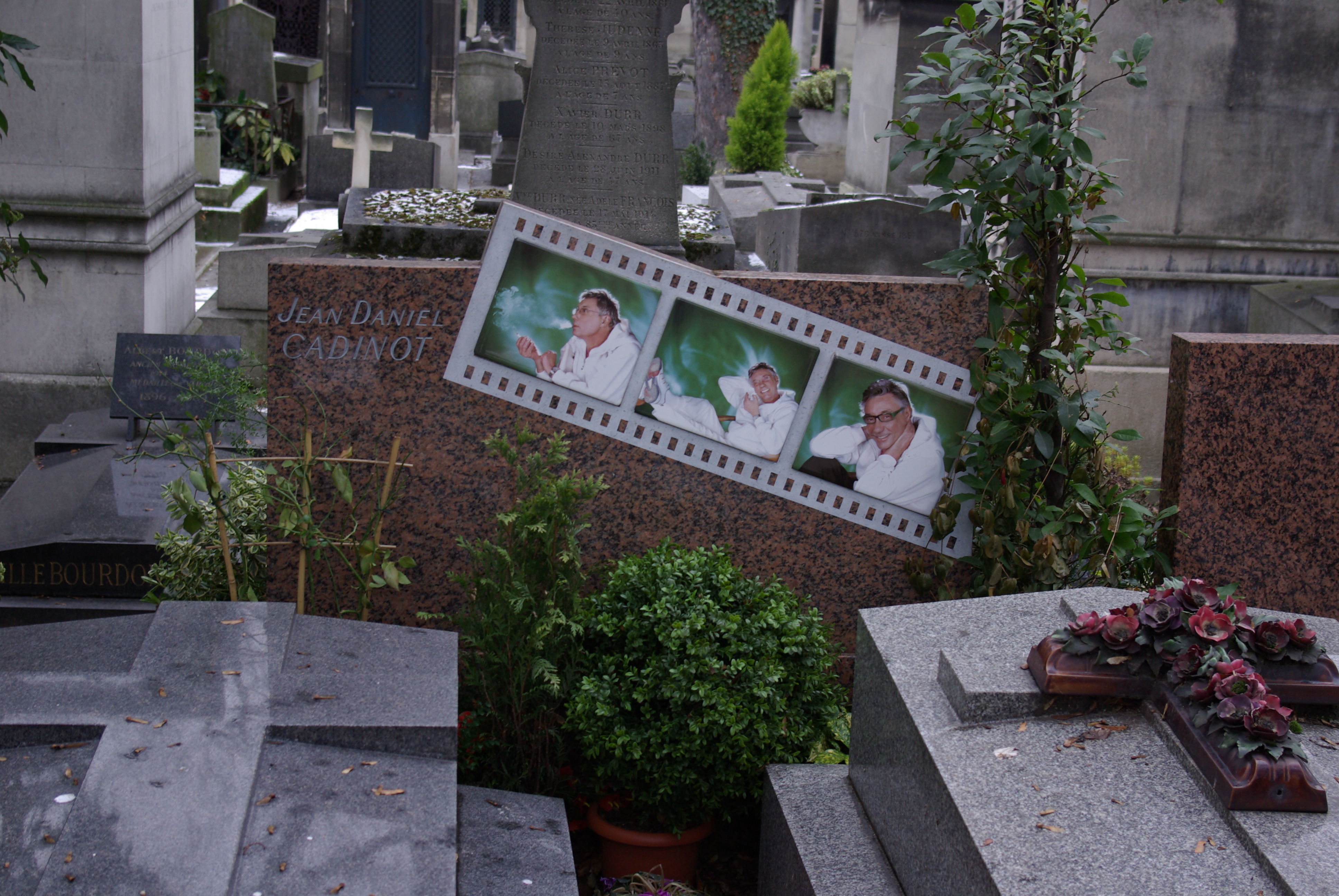 Grabsteinrückseite von Jean Daniel Cadinot auf dem Friedhof Cimetière de Montmartre in Paris